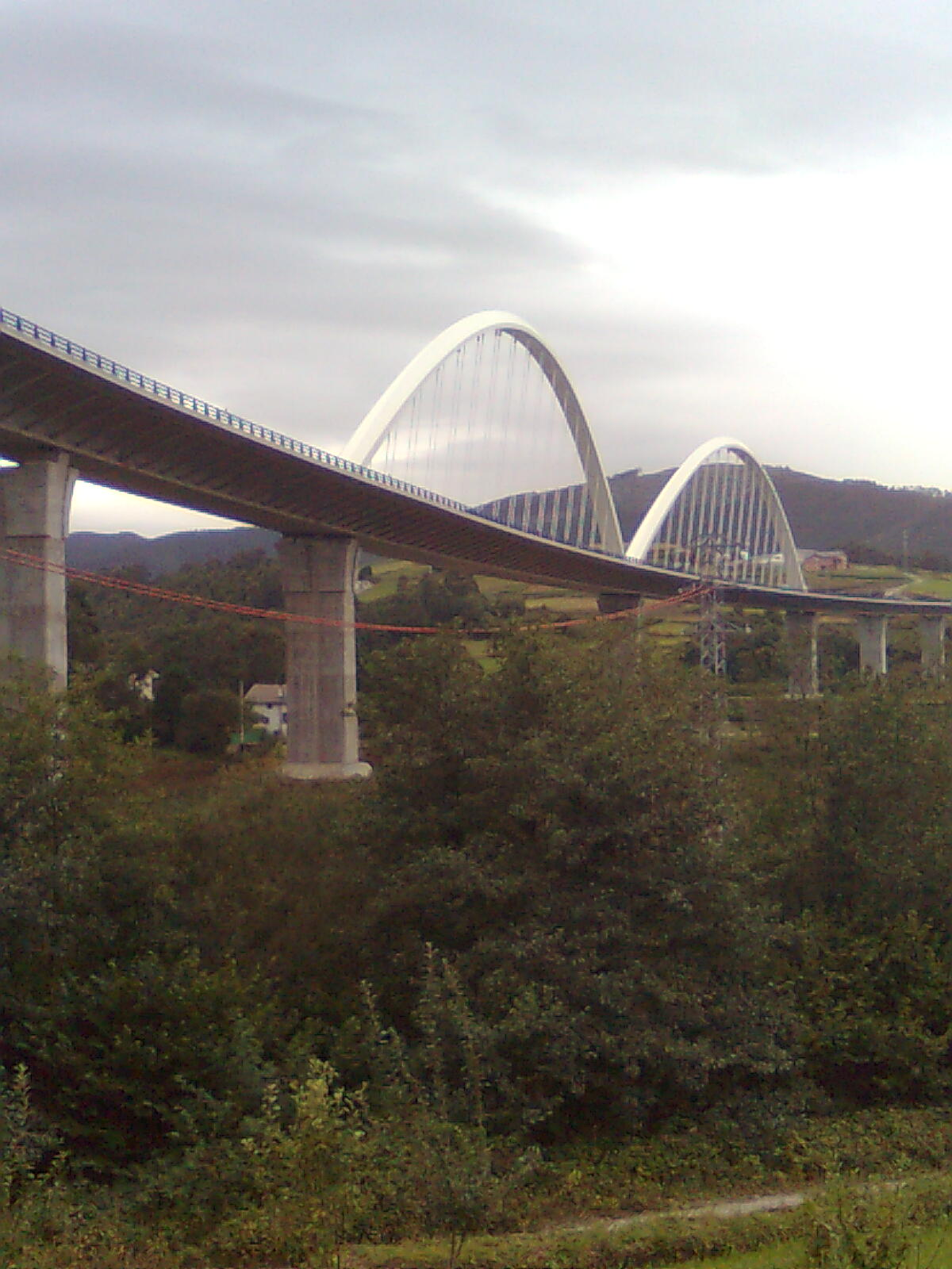 Viaductu enriba'l ríu Navia